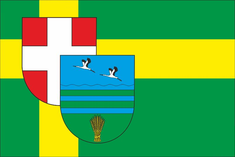 Прапор Камінь-Каширського району